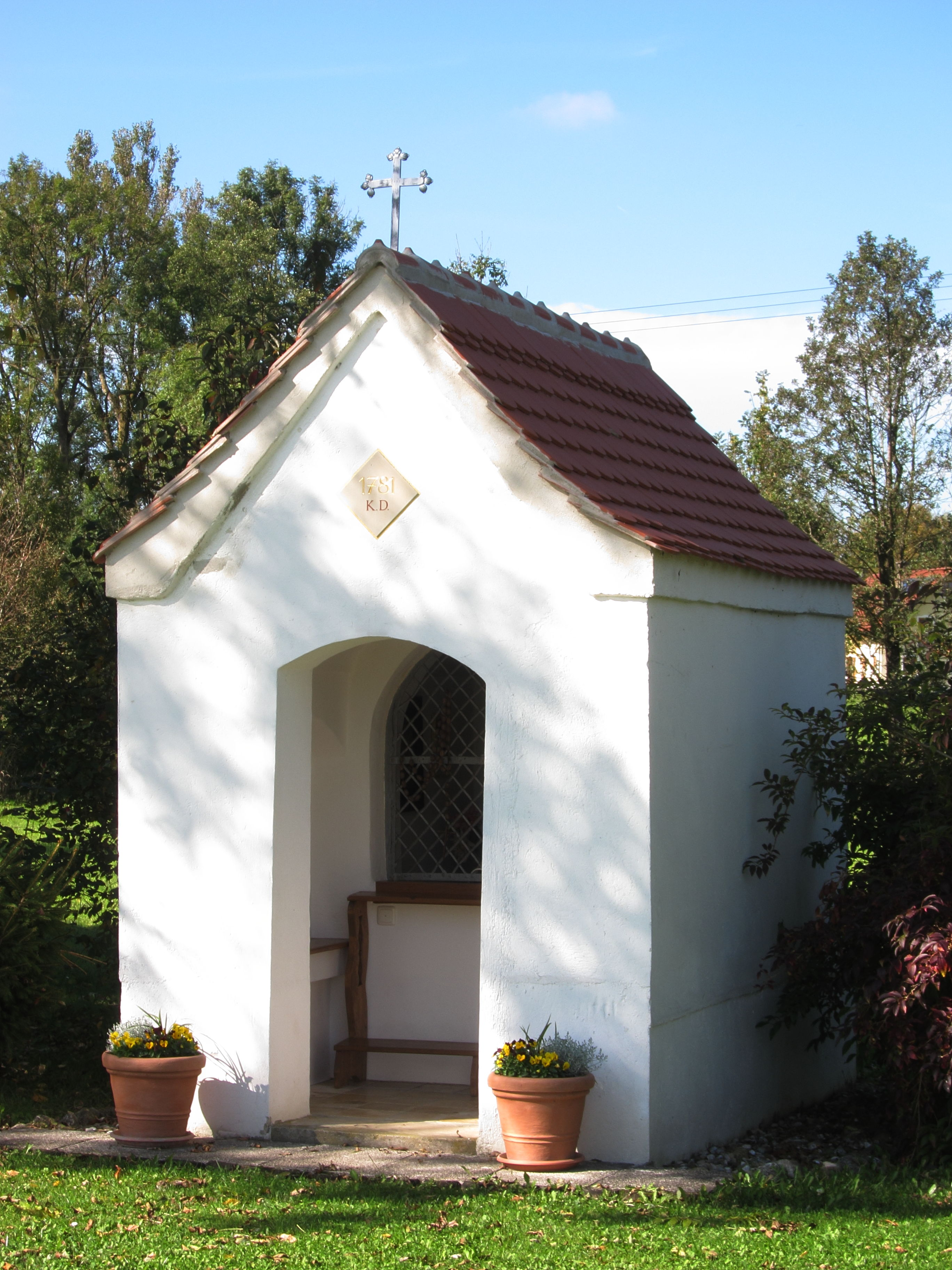 Unterstrogn; Feldkapelle am Weg nach Oberstrogn, erbaut 1781; mit Ausstattung.